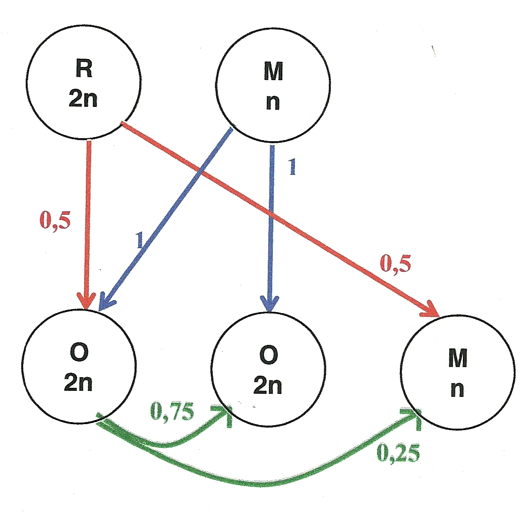 Coefficient d'apparentements entre les individus. Les asymétries de parenté dues au déterminisme haplo-diploïde du sexe, ont pu fortement favoriser l'évolution de l'altruisme.